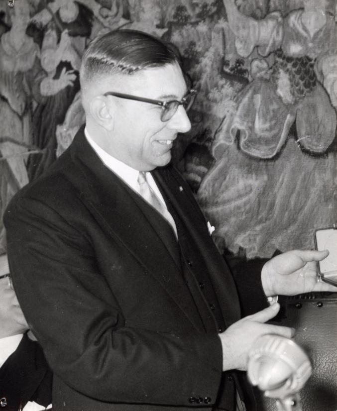 Drs. F.J.W. Gijzels, o.a. staatsecretaris. KVP. Nederland, Eindhoven, 31 januari 1957.